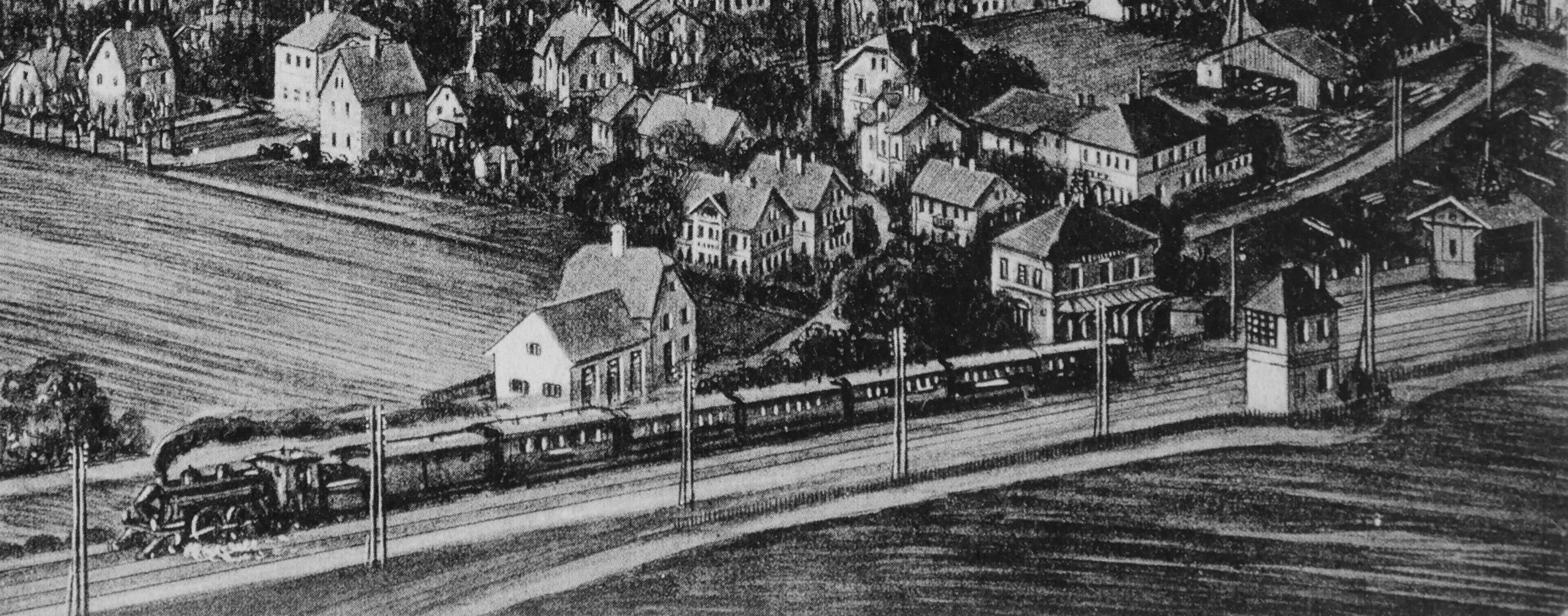 Bahnhof Feldkirchen von Norden mit einem in Richtung Schwaben ausfahrenden Personenzug. Rechts das Empfangsgebäude, das Stellwerk und der Güterschuppen. Ausschnitt aus einer Postkarte um 1911.